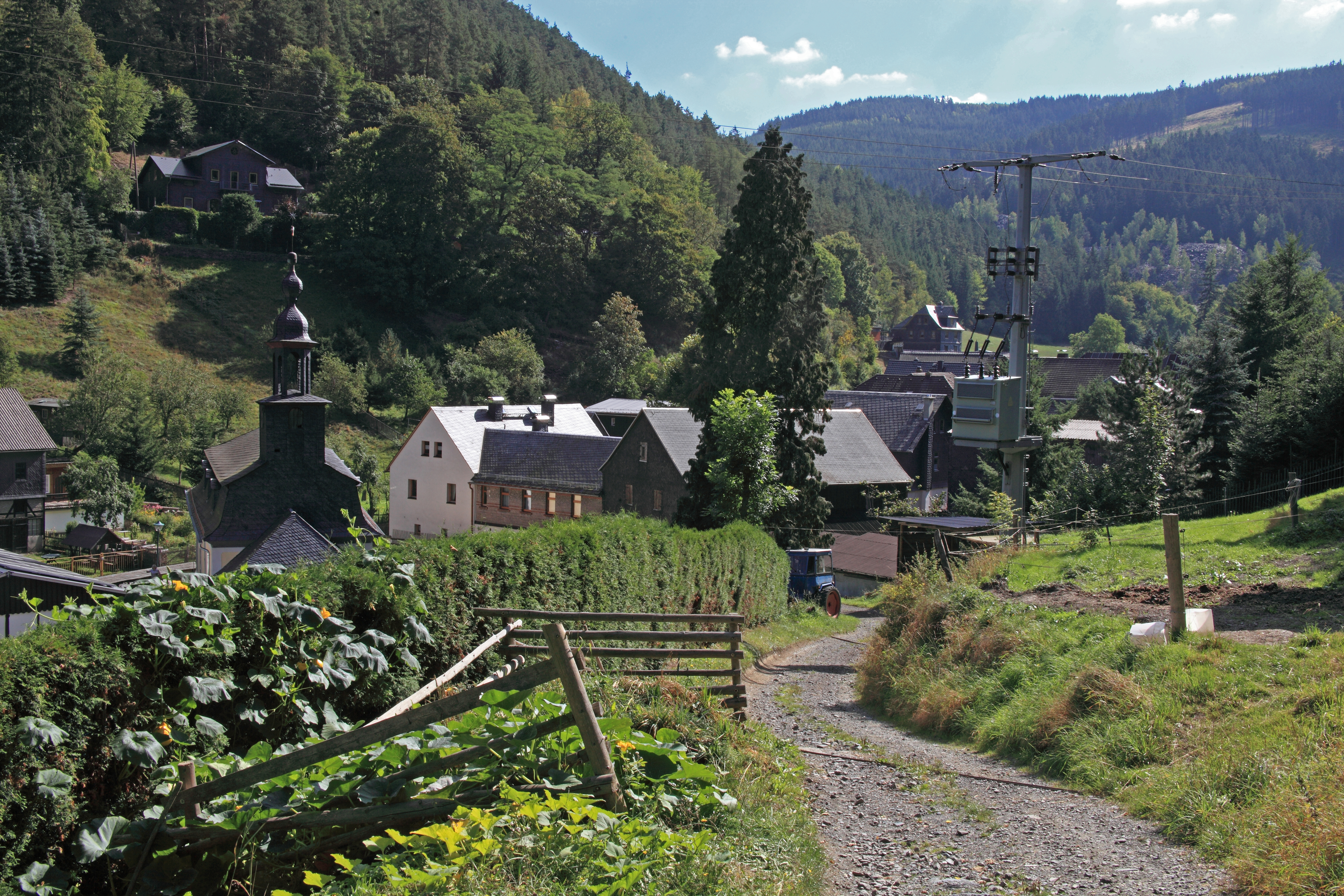 Reichenbach bei Probstzella, Ortsansicht